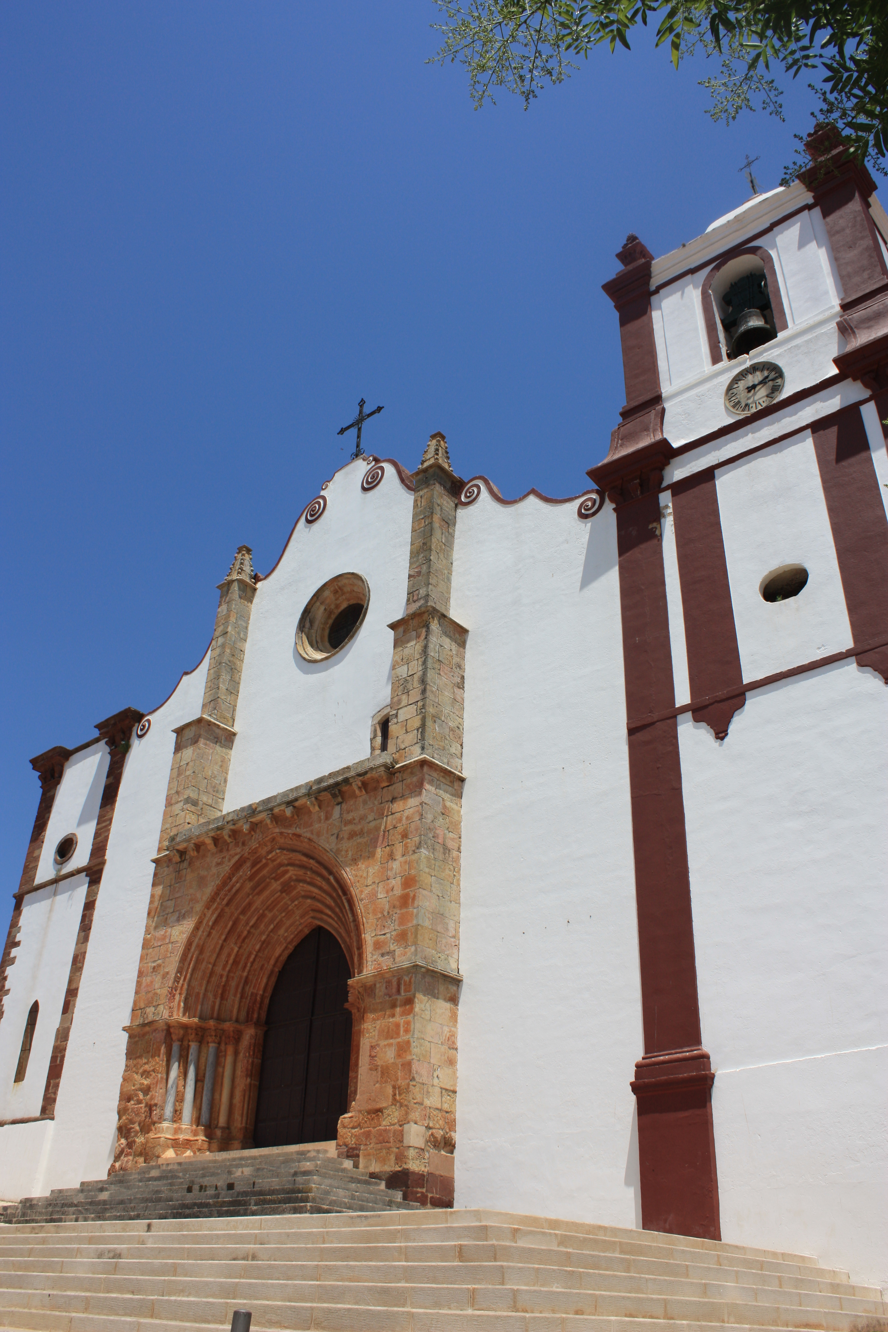 Sé Catedral de Silves This file was uploaded for Wiki Loves Monuments in Portugal with the unique identifier 69825.